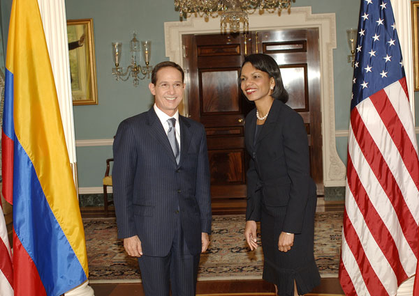 Fernando Araujo Perdomo and Condoleezza Rice.